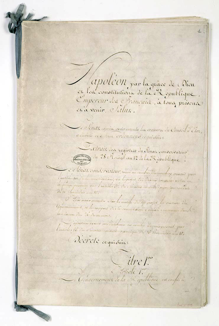 Sénatus-consulte organique conférant à Napoléon Ier la dignité impériale, première page.